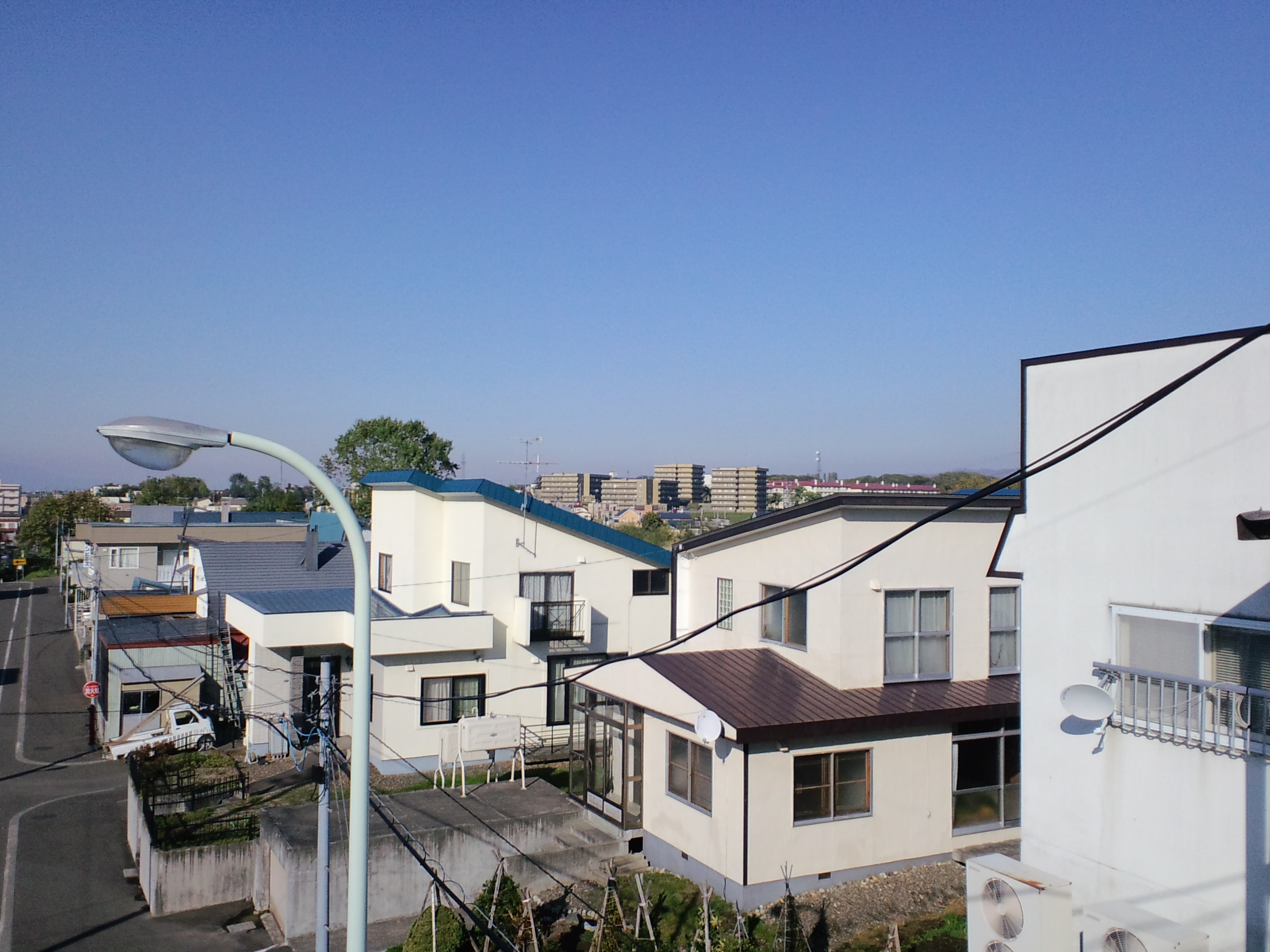 岩見沢市・日の出地区の住宅街、日の出南から日の出台方面